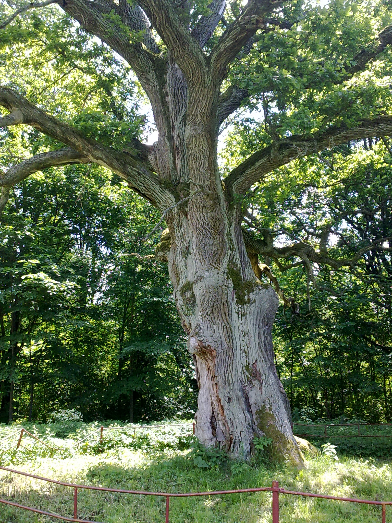 Дуб Напалеона (Мюрата)